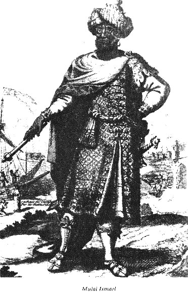 Mouley Ismaïl, sultan du Maroc de 1672 à 1727.